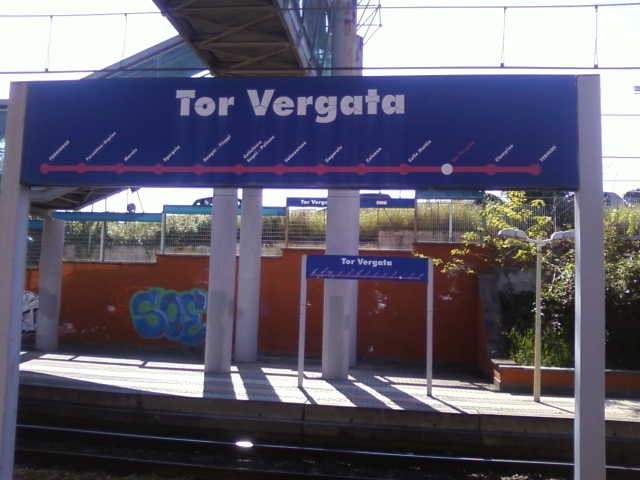 Indicazione linea FR6